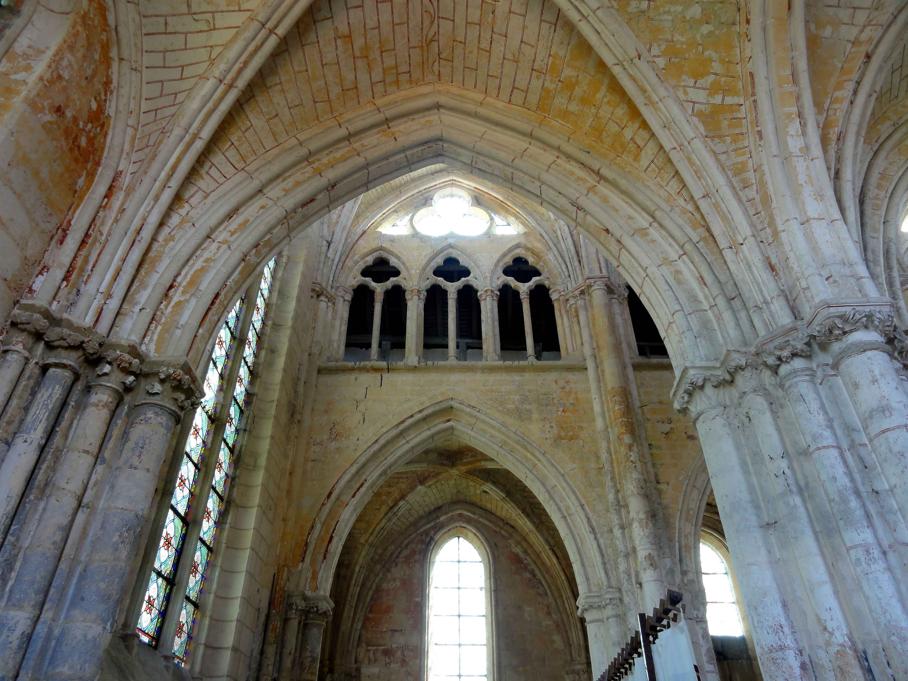 Collatéral nord, vue par la quatrième grande arcade.